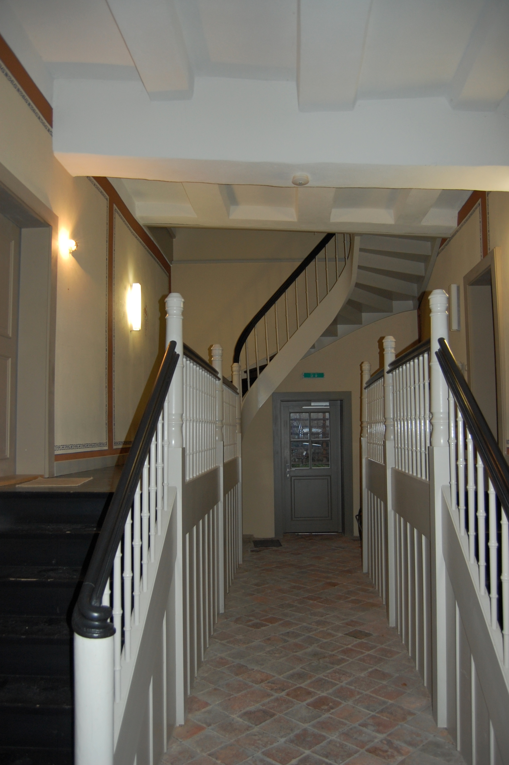 Quedlinburg Goldstraße 25 Hausflur